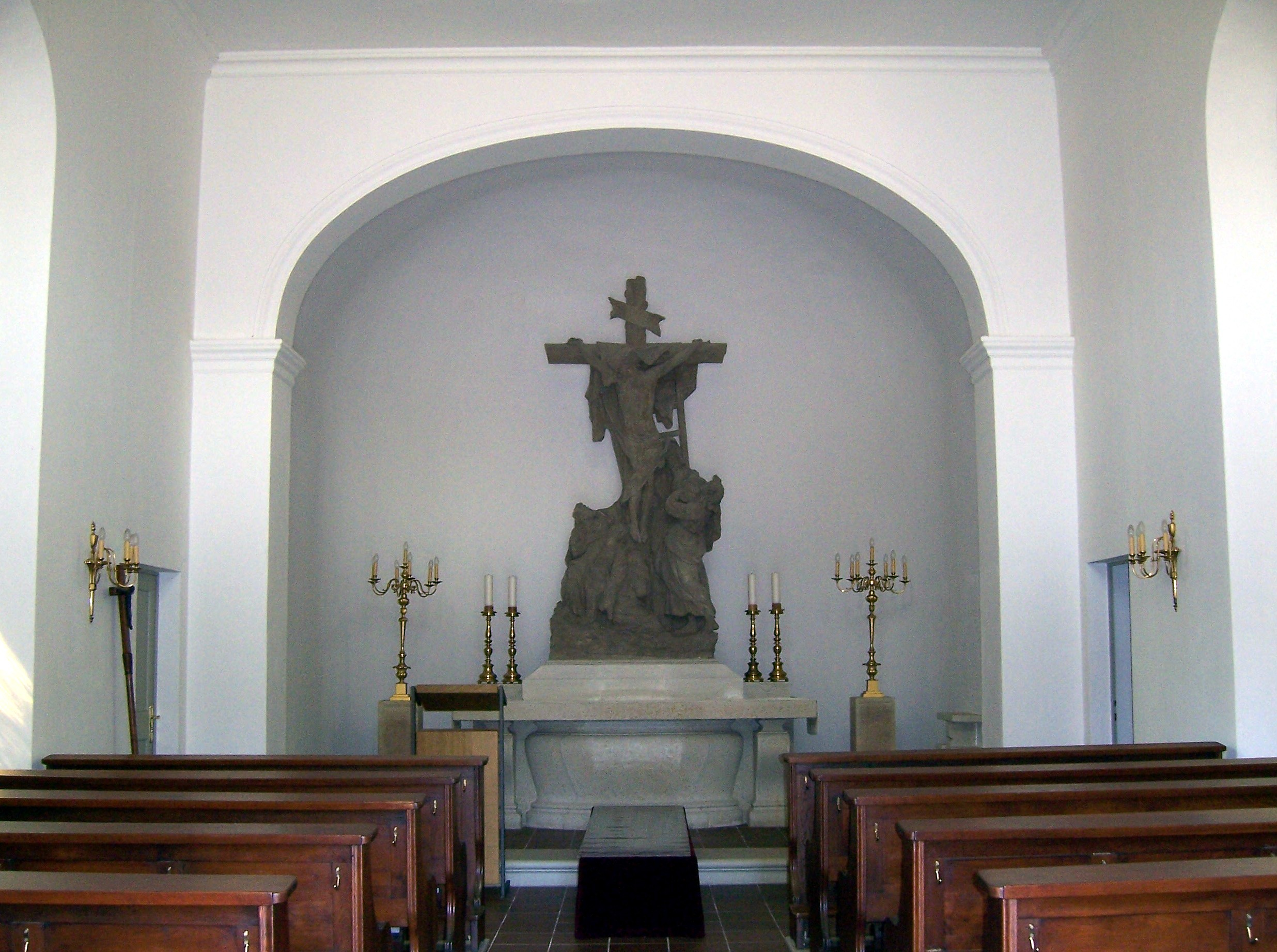 Kreuzigungsgruppe von Balthasar Permoser. Ursprünglich für sein Grab konzipiert, befindet sie sich heute aus Witterungsgründen in der Friedhofskapelle des Alten Katholischen Friedhofs in Dresden.